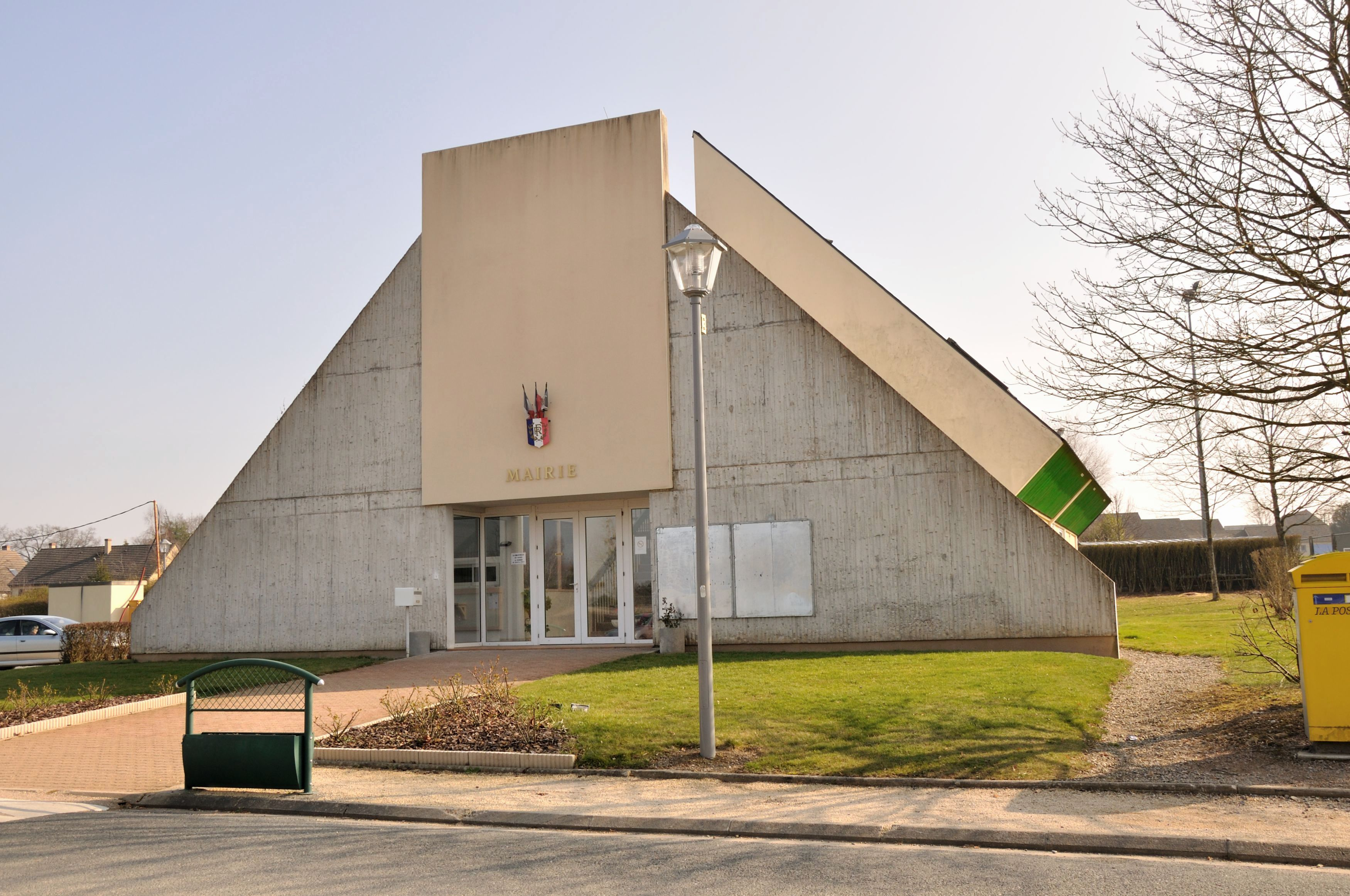 Pouligny-Notre-Dame (Indre) - Mairie